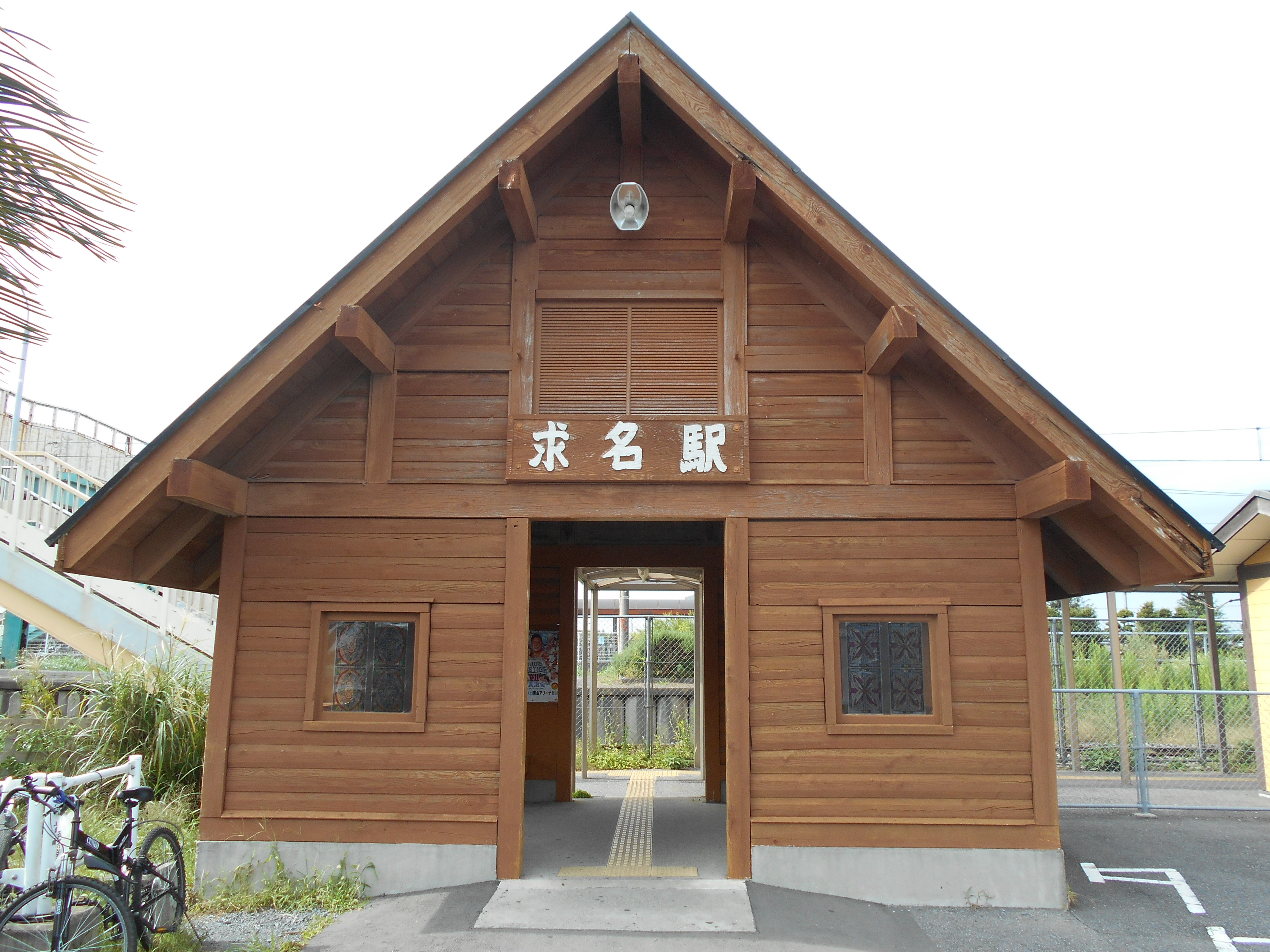 JR東日本 求名駅駅舎